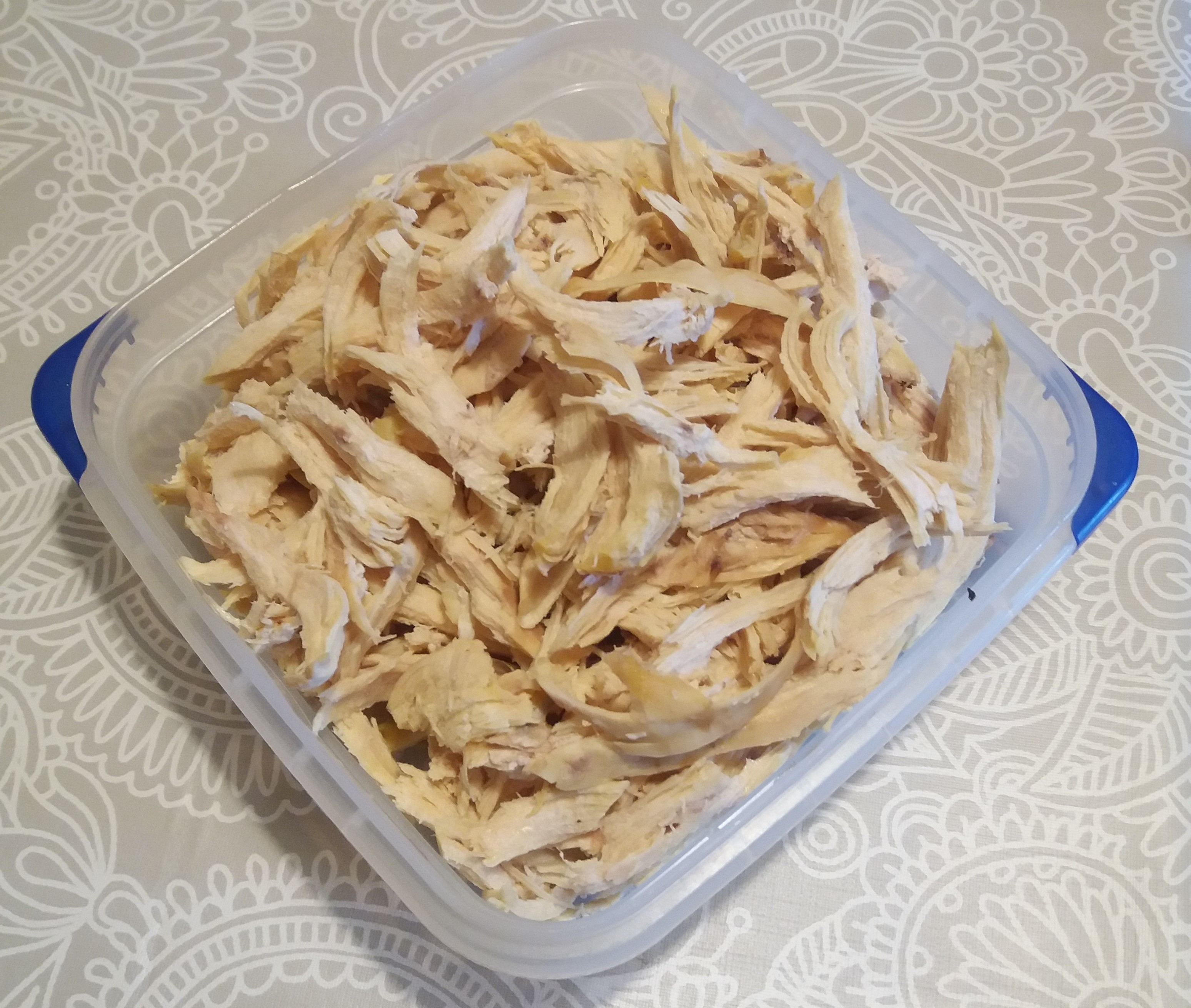 Pollo cocido y deshilachado para preparar ají de gallina o sánguches de pollo.